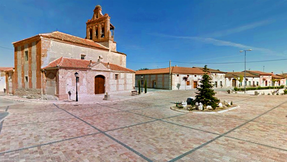 Iglesia de Martin Muñoz de la Dehesa